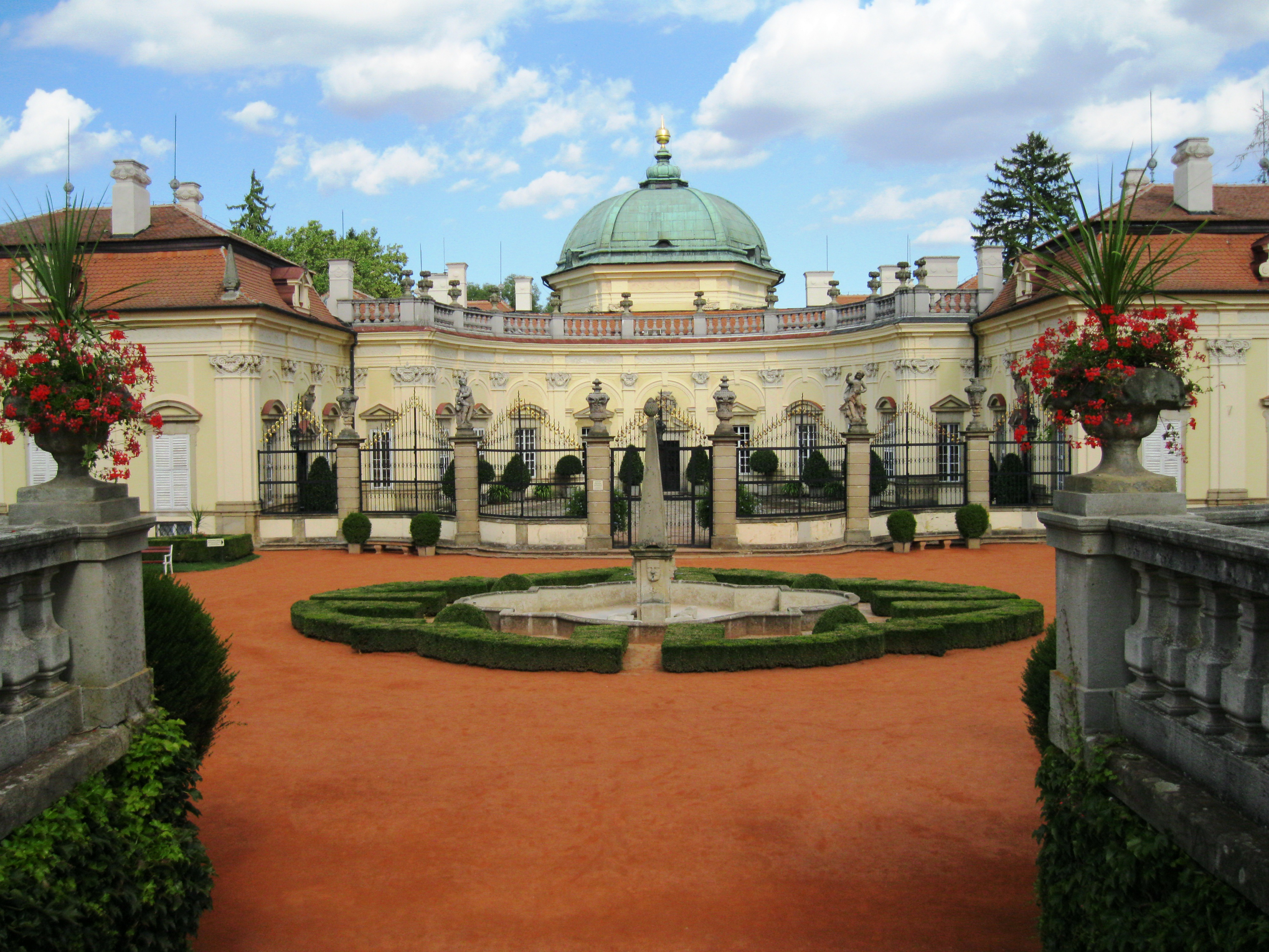 Zámek Buchlovice, tzv. Dolní zámek